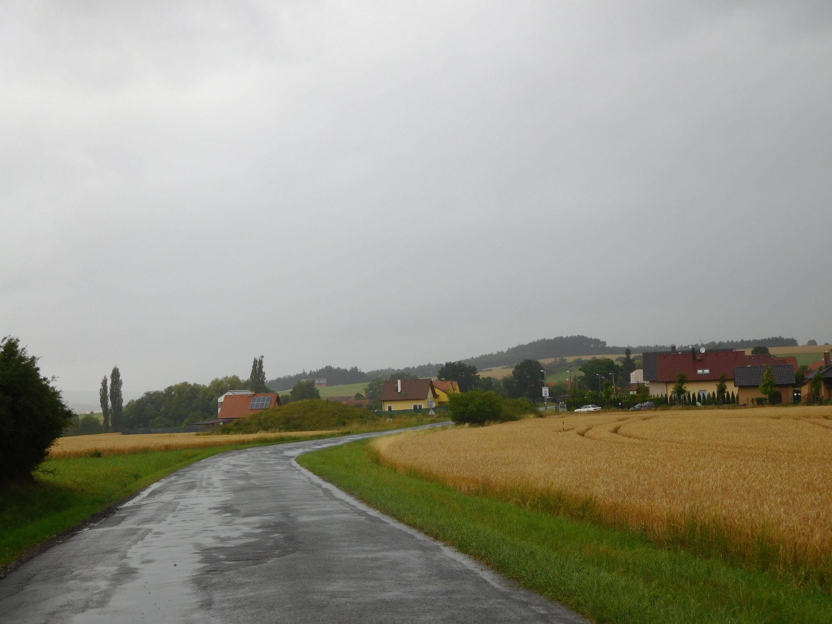 Dolní Vlkýš - celkový pohled od jihovýchodu